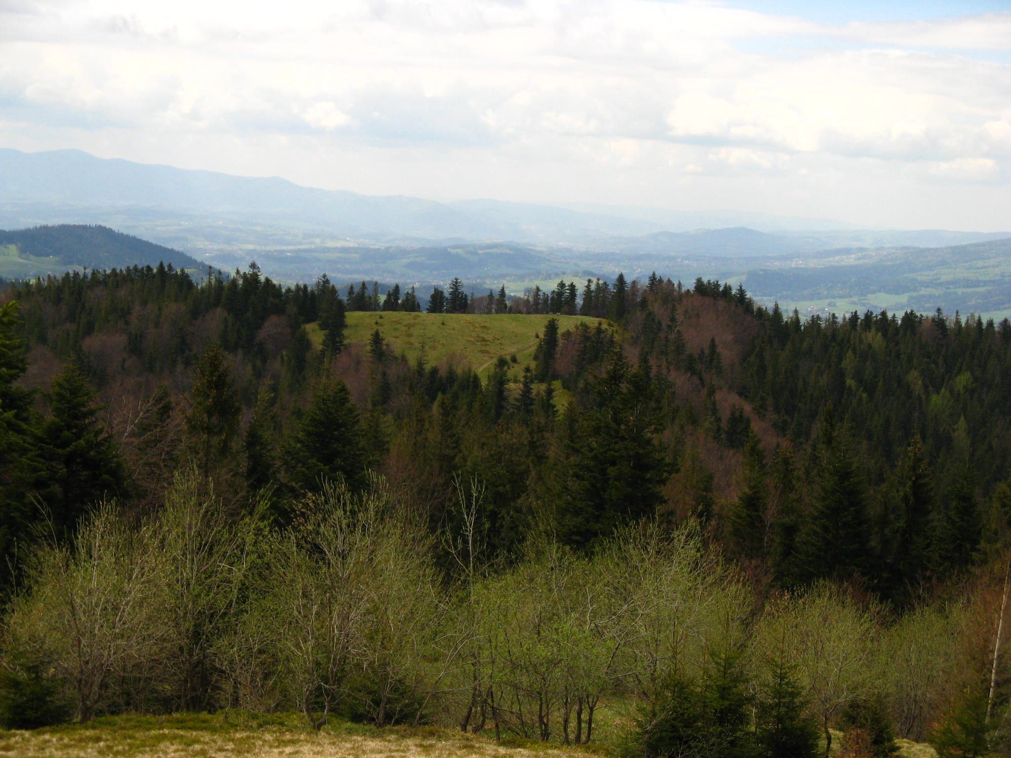 Polana Łąki widziana z Turbaczyka